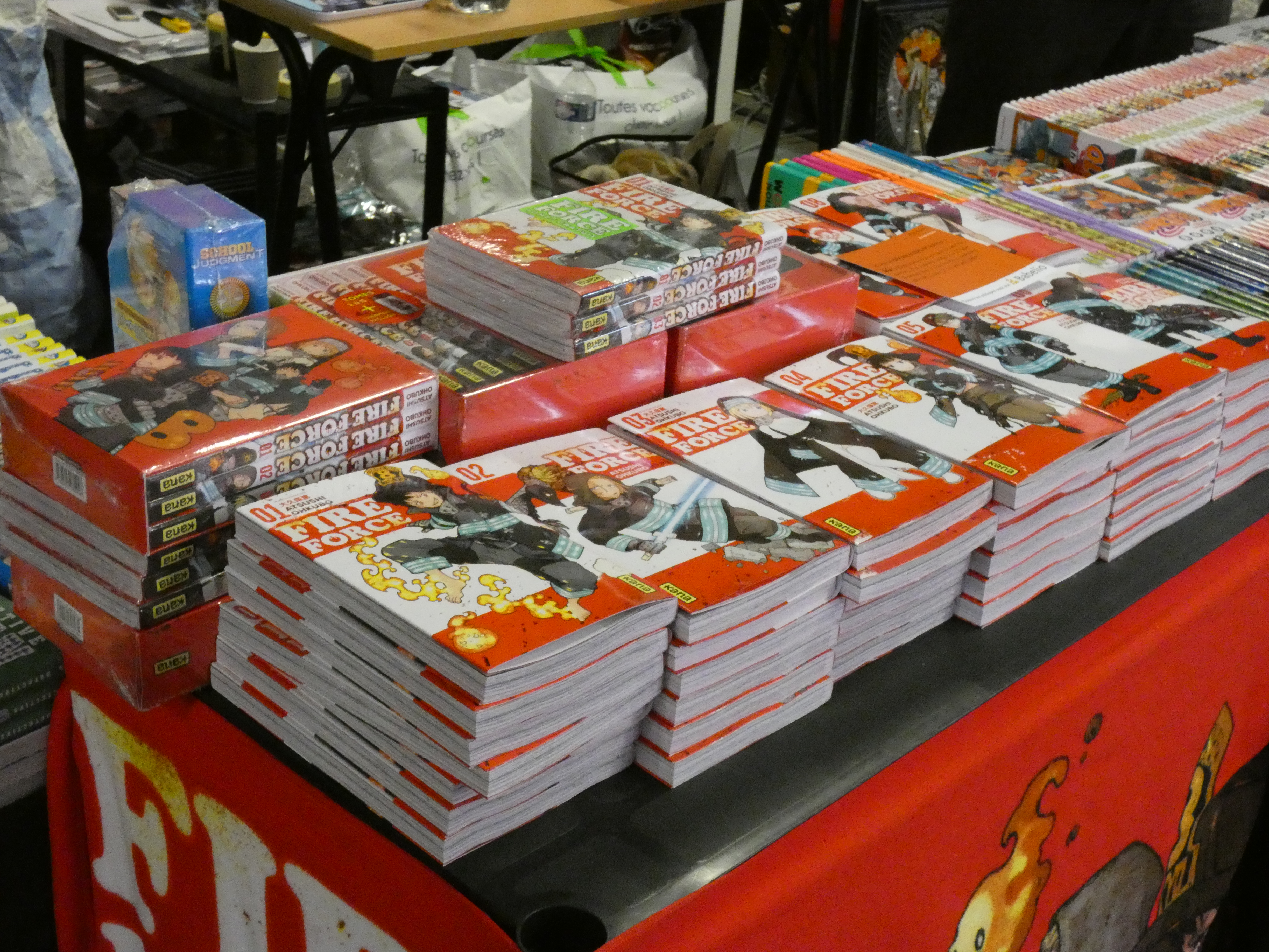 Mangas Fireforce (Kana) au Salon du livre et de la presse jeunesse de Montreuil 2018